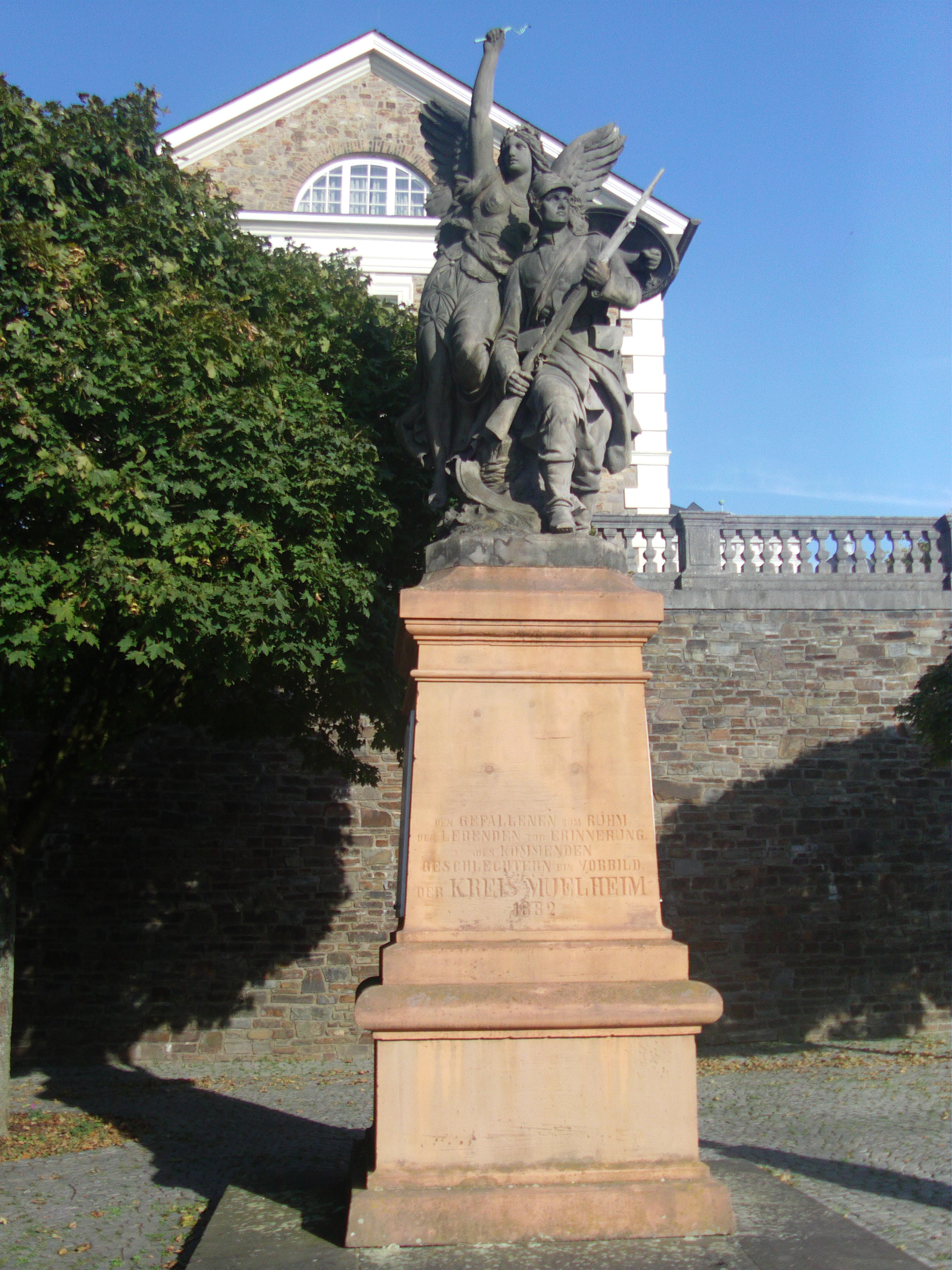 Das Kriegerdenkmal des einstigen Kreises Mülheim für die Gefallenen der Einigungskriege 1864, 1866 und 1870/71 wurde nach einem Entwurf des Königsberger Bildhauers Friedrich Reusch geschaffen und am 25. Juni 1882 vor der Einfahrt zum Areal des Bensberger Schlosses, in dem seit 1840 Kadetten erzogen und ausgebildet wurden, feierlich enthüllt. Dargestellt wird auf diesem Denkmal „Victoria, den stürmenden Krieger schützend“